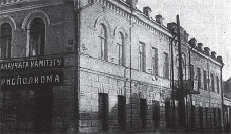 Беларуская (тарашкевіца): Менск (Miensk), рог вуліц Францішканскай (vulica Franciškanskaja) і Юраўскай (vulica Juraŭskaja). Касьцёл Сьвятога Антонія і кляштар францішканаў па перабудове расейскімі ўладамі пад мескую ўправу